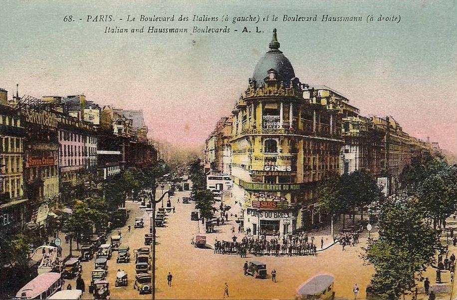 Carte postale colorisée du carrefour Richelieu-Drouot dans la première moitié du XXe siècle. A gauche, le boulevard des Italiens, à droite le boulevard Haussmann. Publicités Savon Cadum, Campari, Longines...